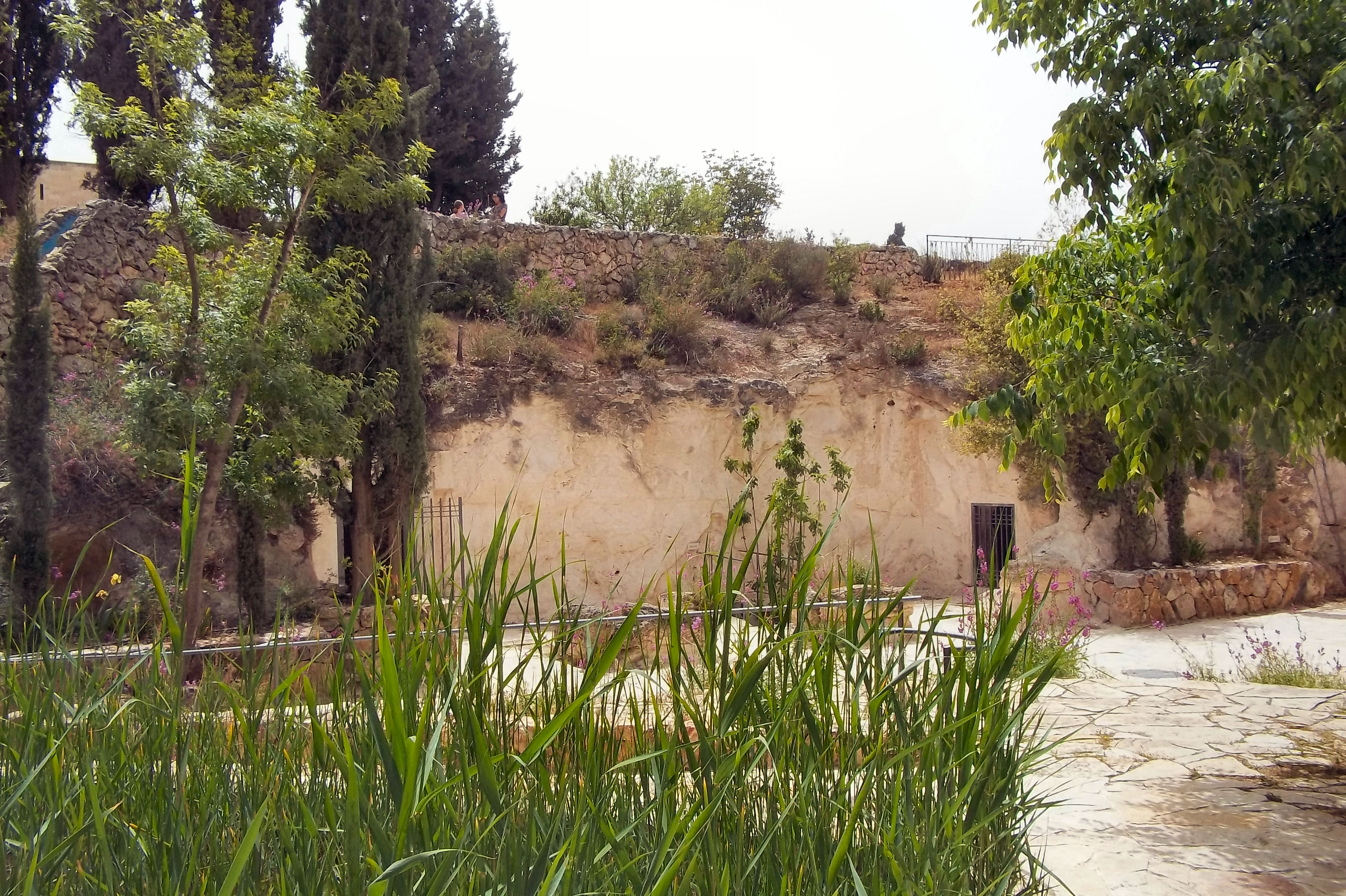 ביקור במערת ניקנור בהר הצופים 2011